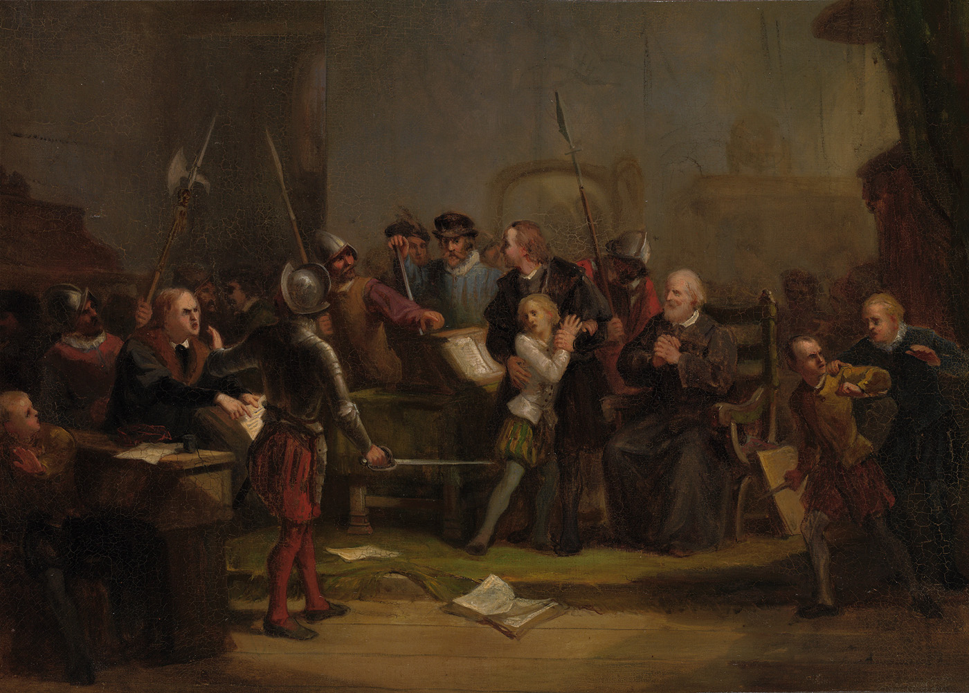 schilderij; tachtigjarige oorlog; Vos, Jacob de; geschiedenis (iconografie)